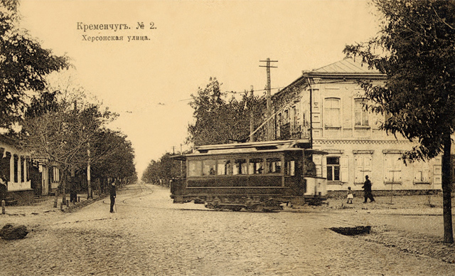 Postcards of old Kremenchuk. Вулиця Херсонська.